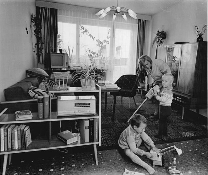 Lütten-Klein, Blick in ein Wohnzimmer Zentralbild Spremberg 8.7.1966 9. Ostseewoche 1966 Lütten-Klein: großes Wohnungsbauvorhaben In Lütten-Klein bei Rostock entsteht gegenwärtig ein großes Neubaugebiet, das in Zukunft bis zu 60.000 Einwohner zählen wird. Der erste Block wurde am 29. April 1966 bezugsfertig übergeben. Familie Fritz (Foto) fühlt sich wohl in ihrer neuen Wohnung, die mit allem Konfort wie z.B. Fernheizung und Einbauküche ausgestattet ist. Regina Fritz (Mitte), von Beruf Friseuse, zur Zeit Hausfrau, wird demnächst ihren Beruf wieder aufnehmen, jetzt aber muß sie noch viel Zeit finden, mit ihrem Sohn Jens (links) und seinem Freund Ralf (rechts) zu spielen.